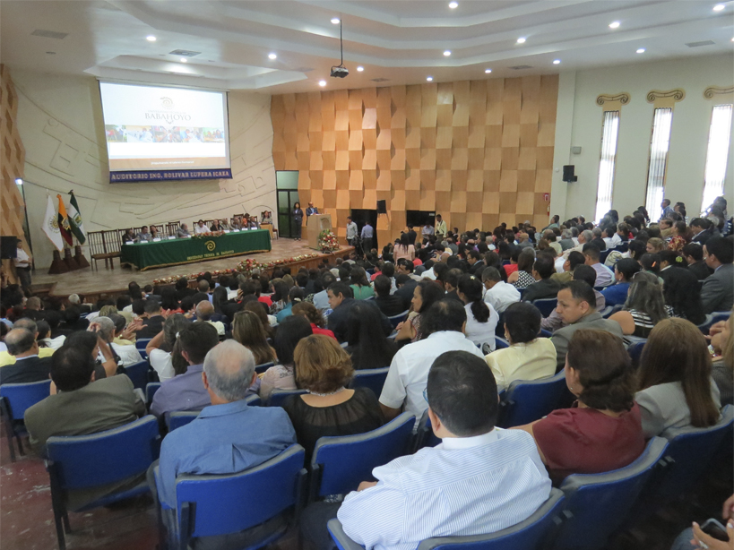 Science , Technology and Innovation